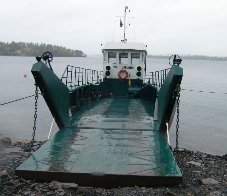 MS Thorbjørn ved Utøykaia